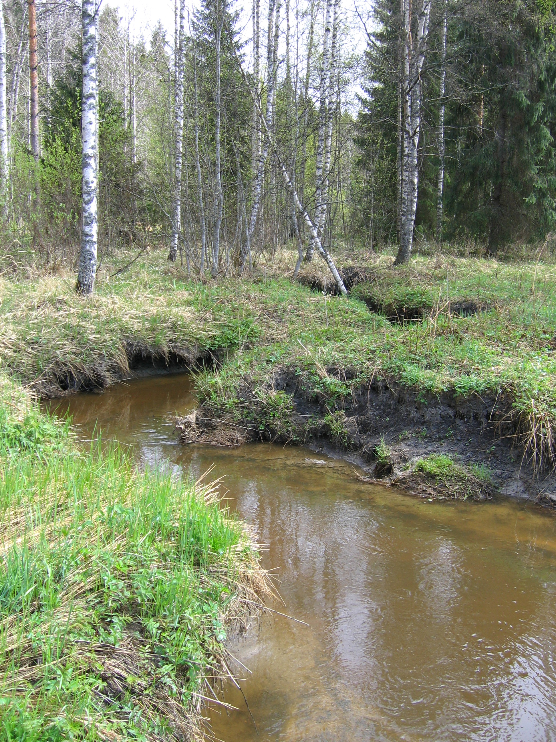 Ennallistettu Myllypuro